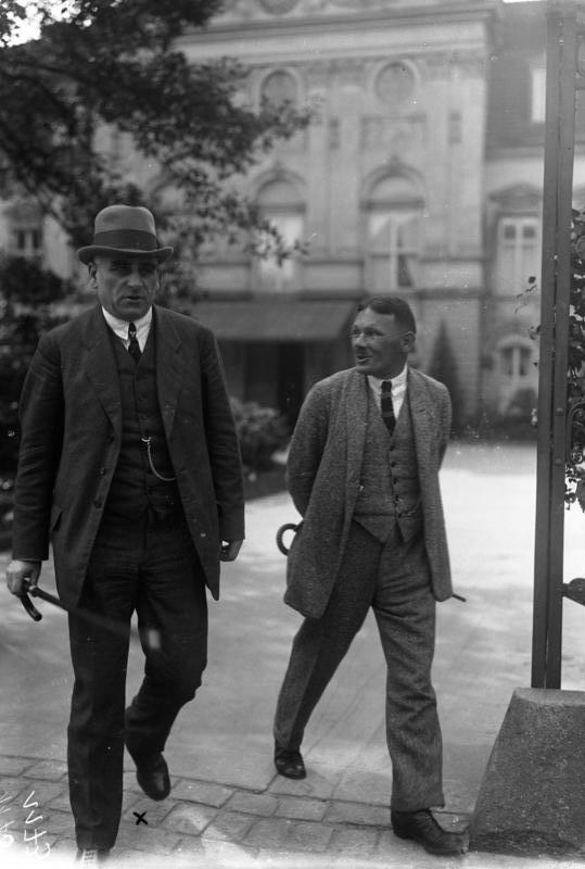 Anwärter für den Reichspräsidenten-Posten. Der frühere Preußische Ministerpräsident Braun x wurde von den Sozialdemokraten für den Reichspräsidentenposten aufgestellt. Letzte Aufnahme desselben.